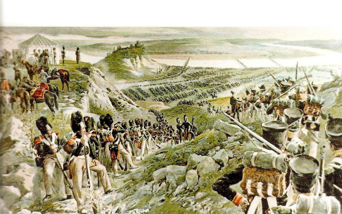 French army crosses the Niemenlabel QS:Lit,"La Grande Armata attraversa il Niemen dando inizio alla campagna di Russia" label QS:Len,"French army crosses the Niemen"